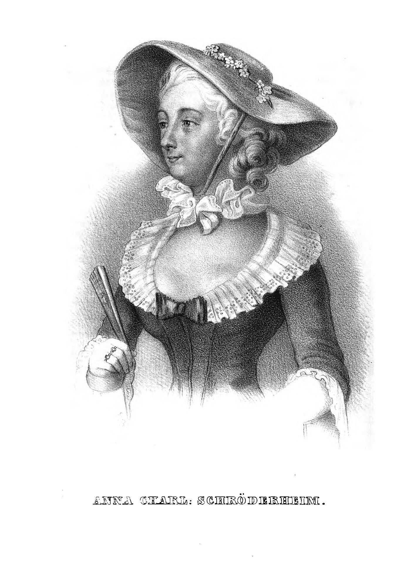 Anna Charlotta Schröderheim, ursprungligen Anna Charlotta von Stapelmohr, född 24 september 1754 i Stockholm, död där 1 januari 1791, var en svensk adelsdam